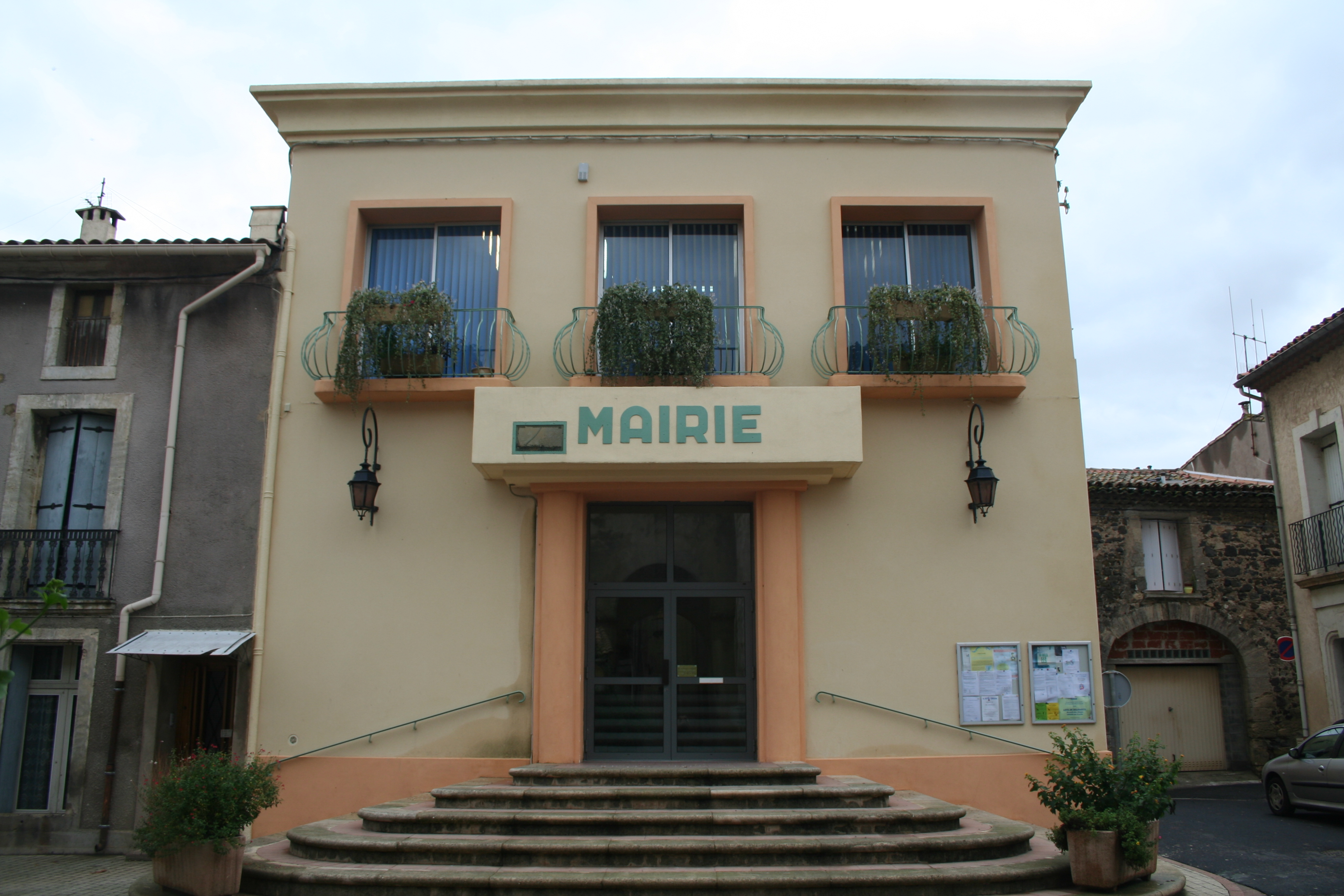 Lézignan-la-Cèbe (Hérault) - mairie.